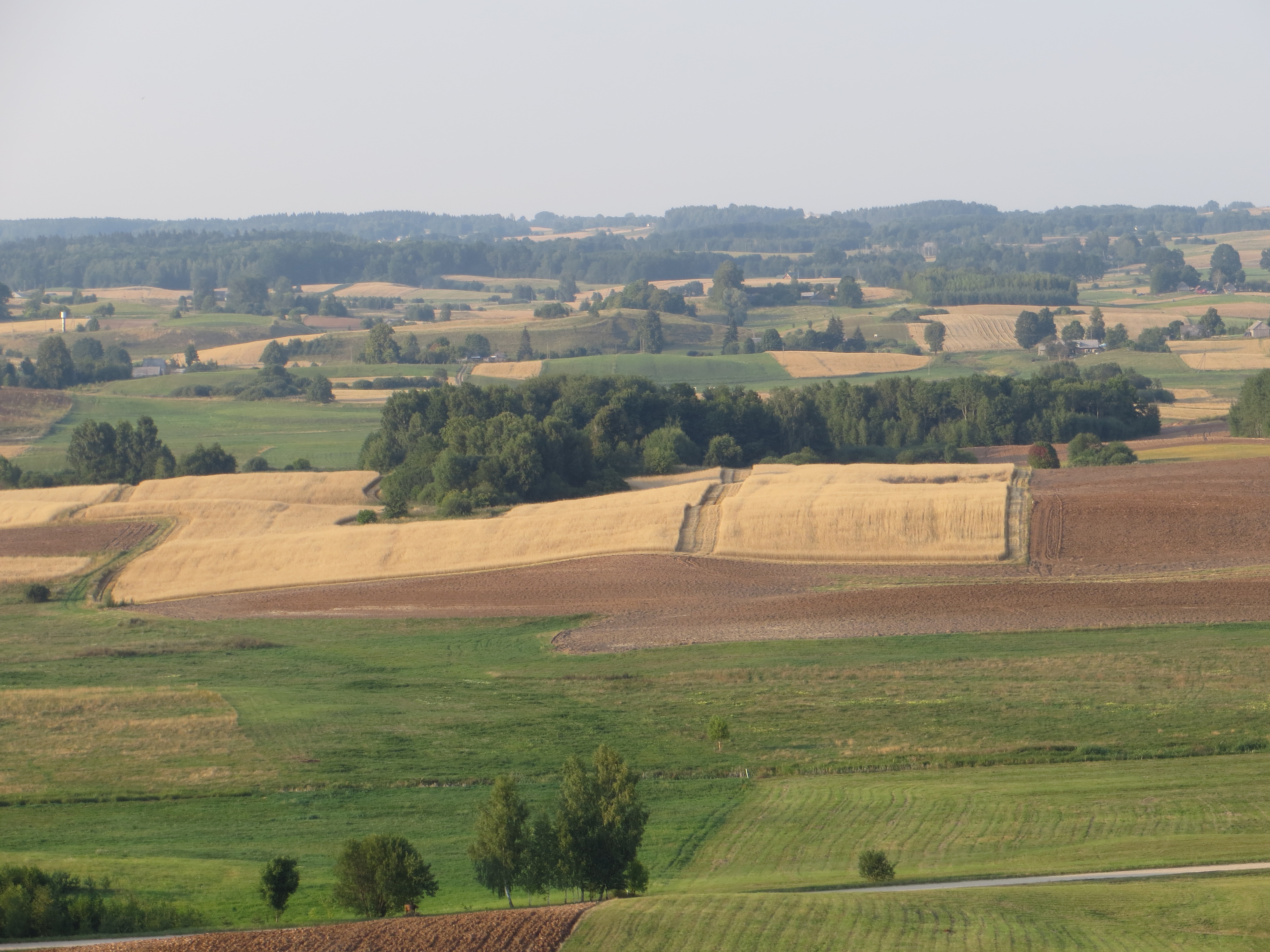 Lazdijų sen., Lithuania